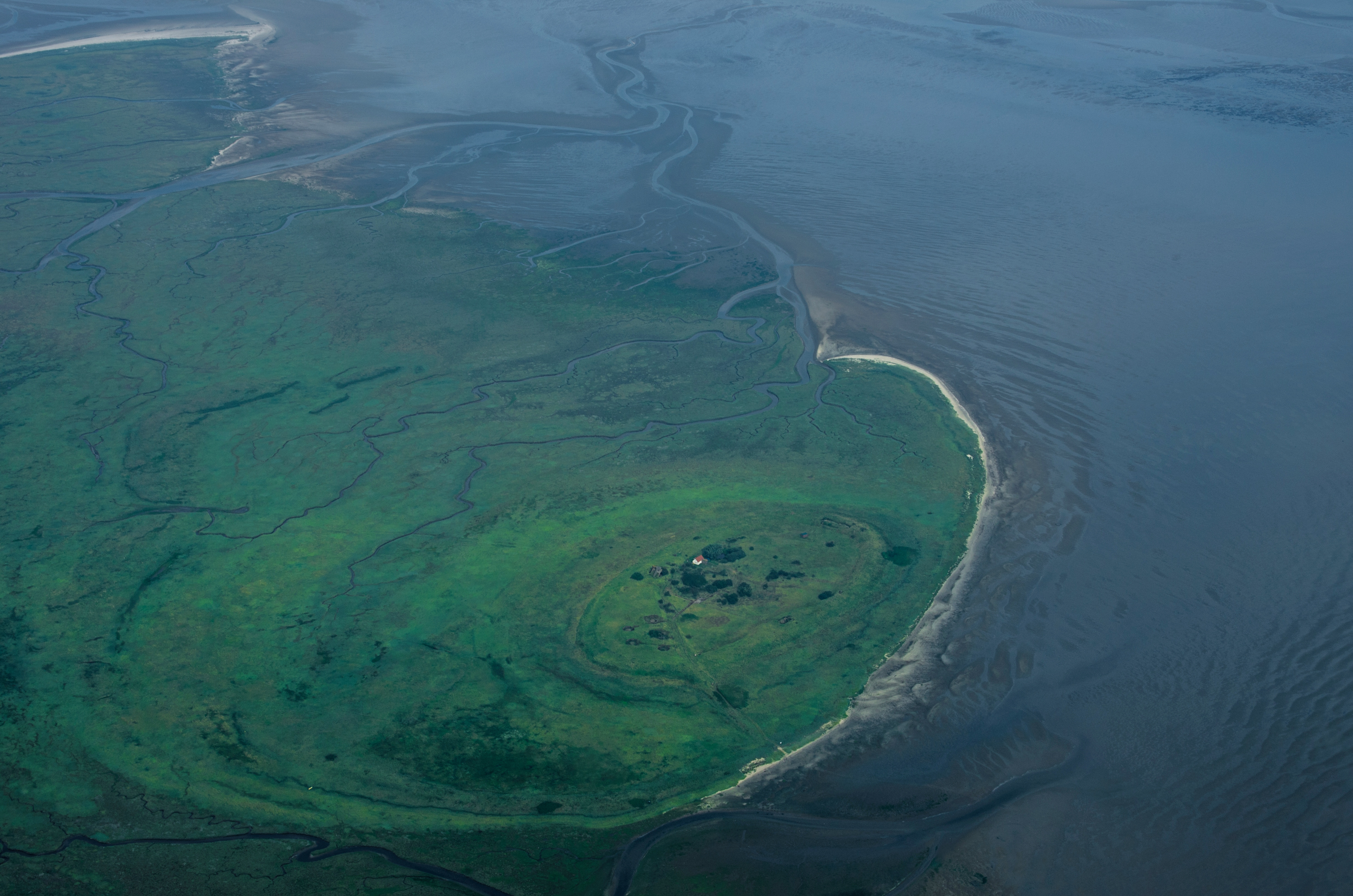 Mellum (auch Alte Mellum) ist eine relativ junge Düneninsel in der Nordsee, neun Kilometer östlich von Horumersiel im Land Niedersachsen entfernt. Die Insel entwickelte sich aus einem Hochsand, sie liegt an der Nordspitze des Hohe-Weg-Wattrückens, den Nordseeküstenorten Horumersiel sowie Schillig vorgelagert. Erst im letzten Viertel des 19. Jahrhunderts ist sie auf der Wattwasserscheide zwischen Jade und Weser entstanden. Sie ist eine von drei unbewohnten Inseln im Nationalpark Niedersächsisches Wattenmeer, die alle strengen Naturschutzbedingungen unterliegen. Ob Mellum zu den Ostfriesischen Inseln zählt, ist umstritten, da die Insel östlich von Wangerooge und der Außenjade liegt. Nach der Abgrenzung durch das Bundesamt für Naturschutz gehört die Mellum nicht mehr zu den Ostfriesischen Inseln, sondern zu den Watten im Elbe-Weser-Dreieck. Knapp sieben Kilometer nordöstlich liegt die gelegentlich trockenfallende, rund 0,4 Quadratkilometer große Sandplate West-Eversand. Weitere neun Kilometer nordöstlich liegt der Hohe Knechtsand. Quelle: Wikipedia